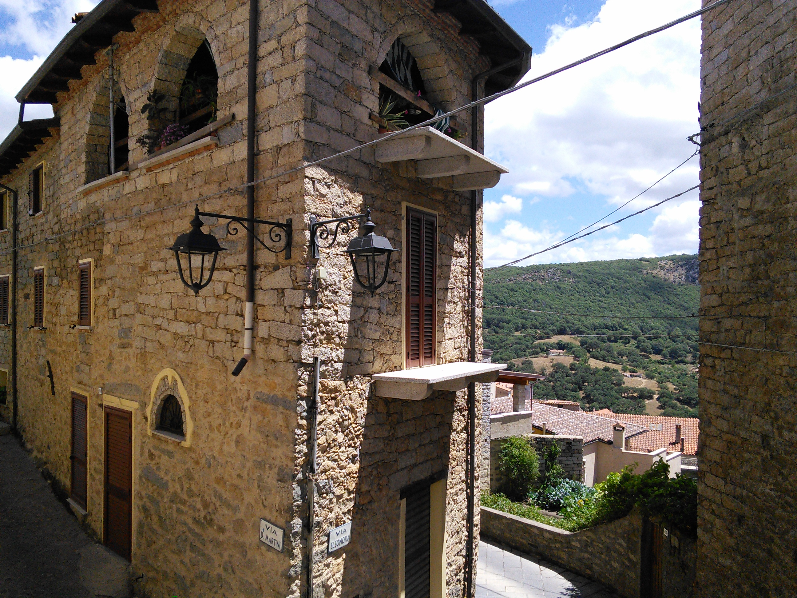 Stadtbild von Gavoi, Nuoro, Italien, Juli 2014